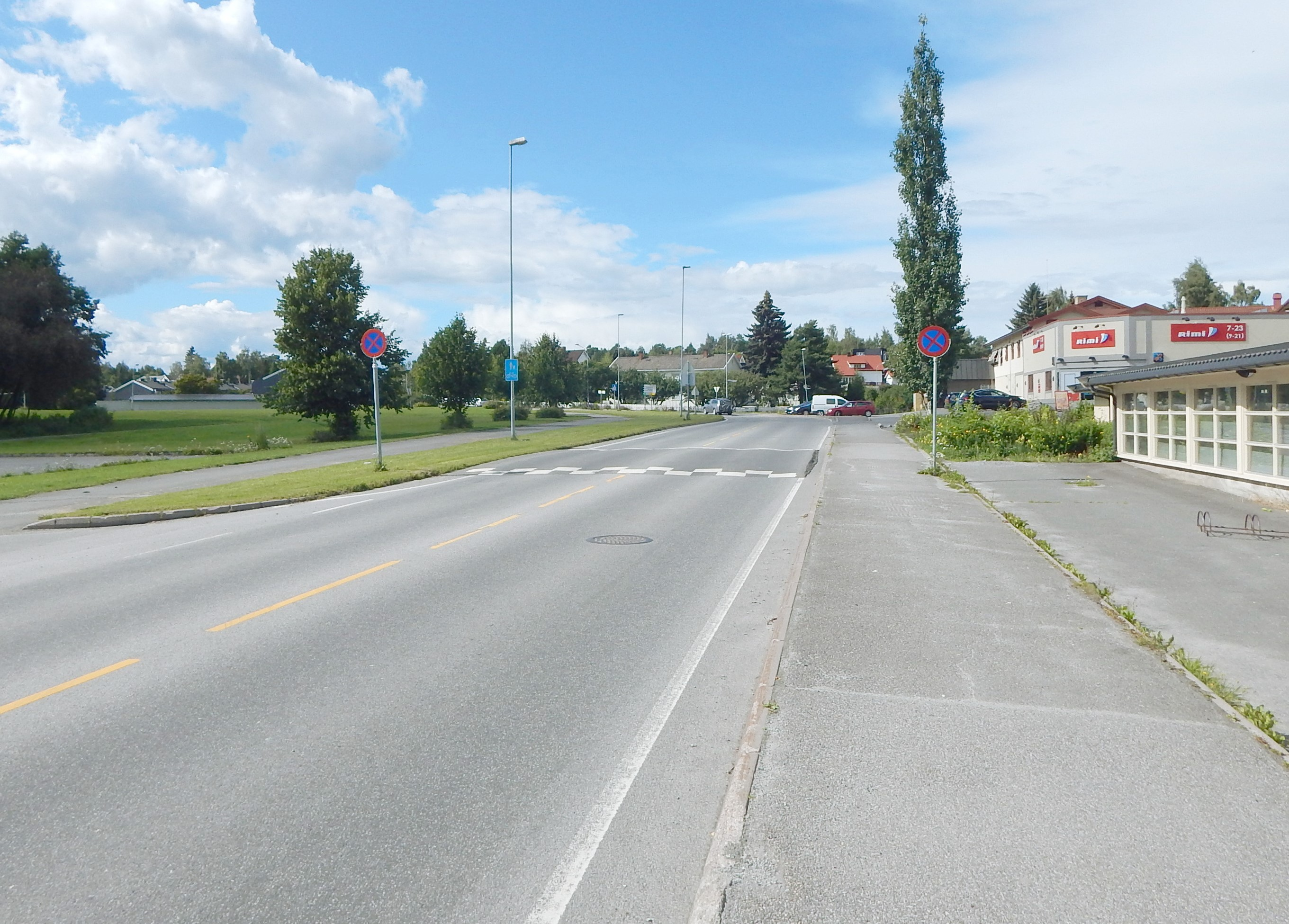 Ringgata på Hamar